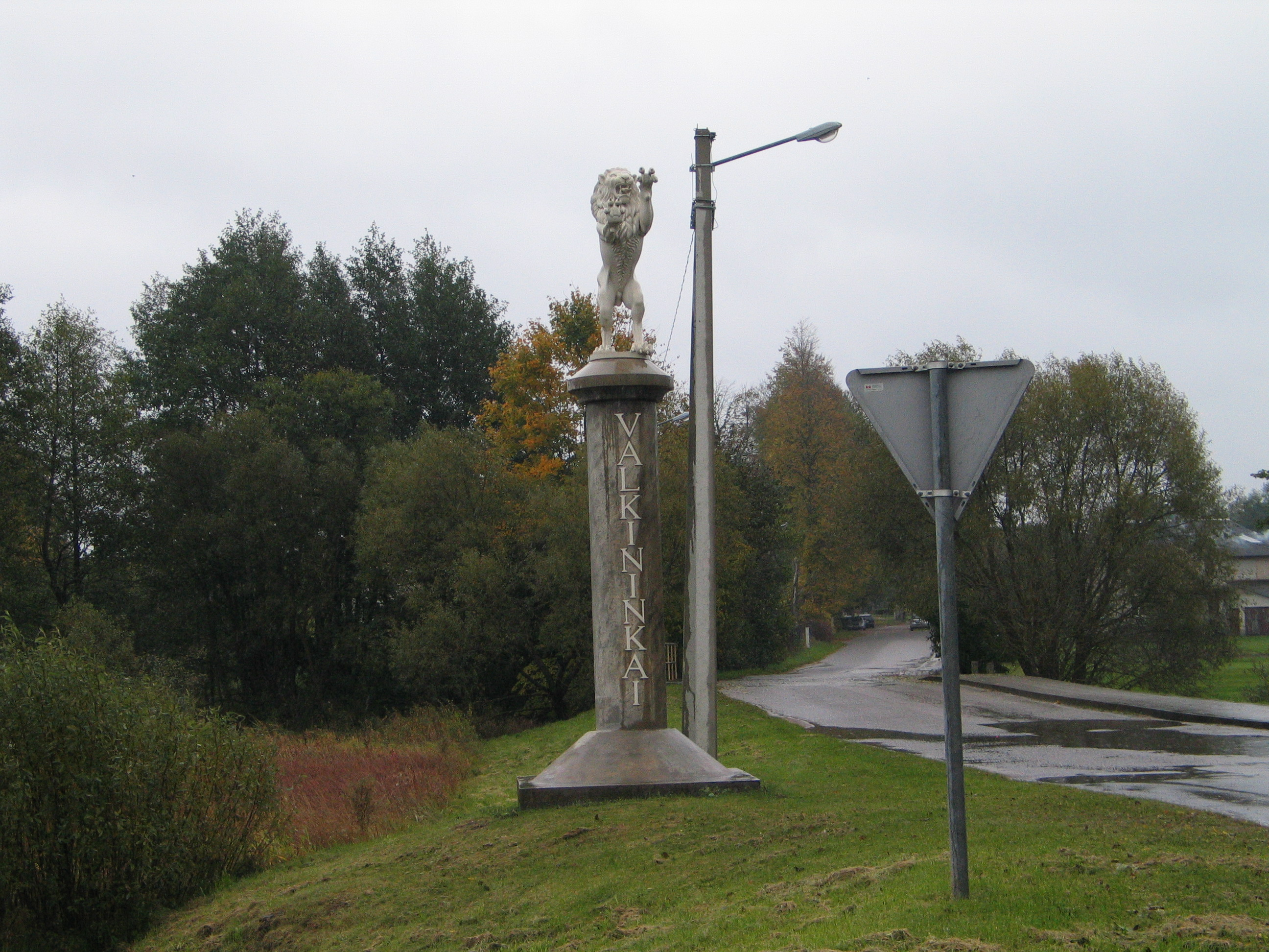 Лев при въезде в деревню Валкининкай